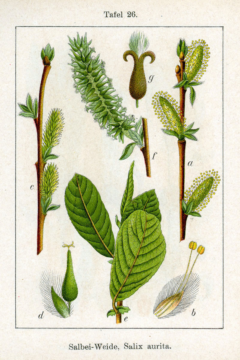 Salix aurita L. Original Description Salbei-Weide, Salix aurita